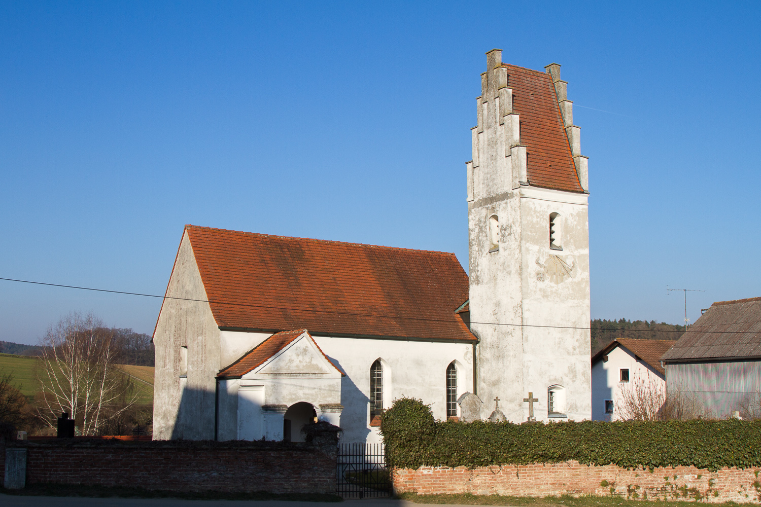 verputzter Saalbau mit Steilsatteldach, eingezogenem Polygonalchor und südlichem Chorflankenturm mit steilem Treppengiebel, flachgedecktes Langhaus und Chor mit Netzgewölbe, Mitte 15. Jahrhundert; mit AusstattungThis is a photograph of an architectural monument.